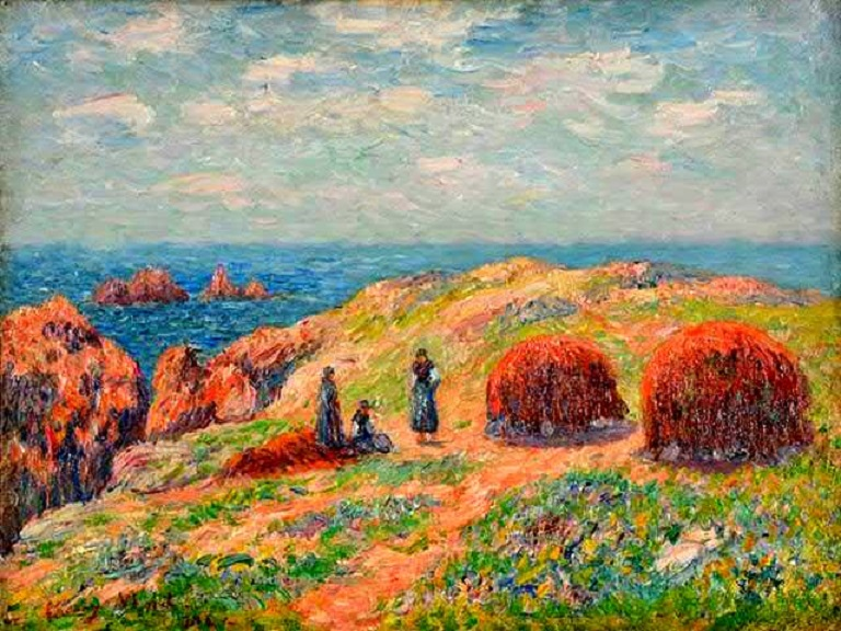 ce tableau représente des goémonières et des tas de goémon en train de sécher